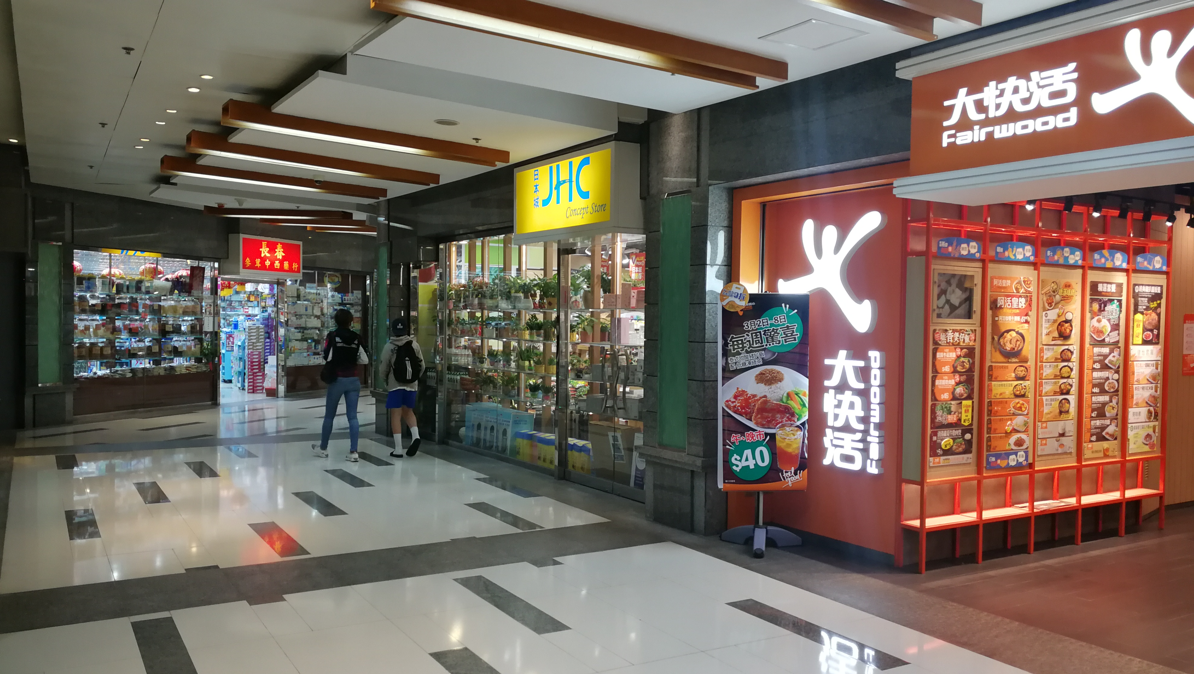 東涌映灣薈